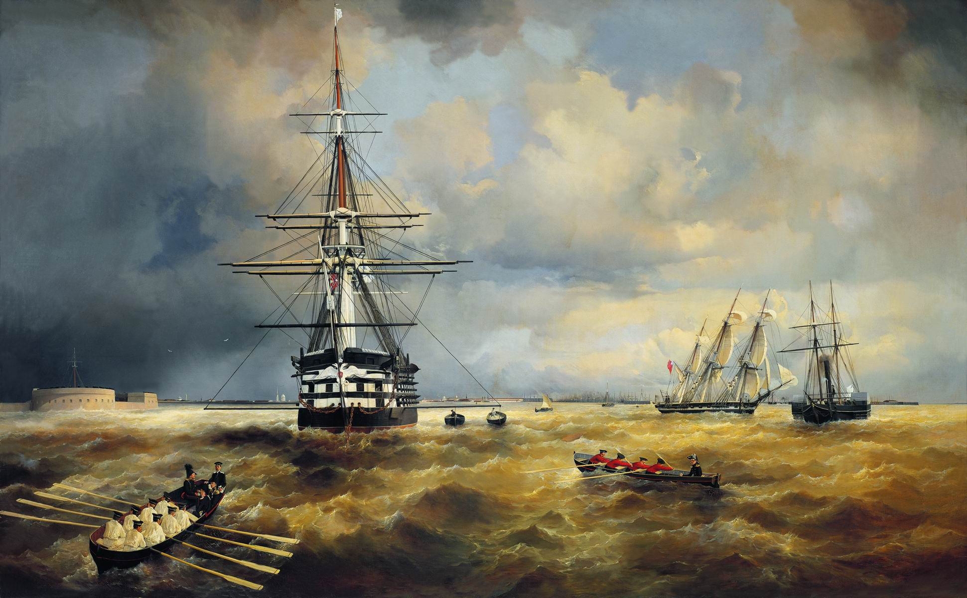 Кронштадтский рейд. 1840 Холст, масло. 124х199см. Центральный военно-морской музей, Санкт-Петербург